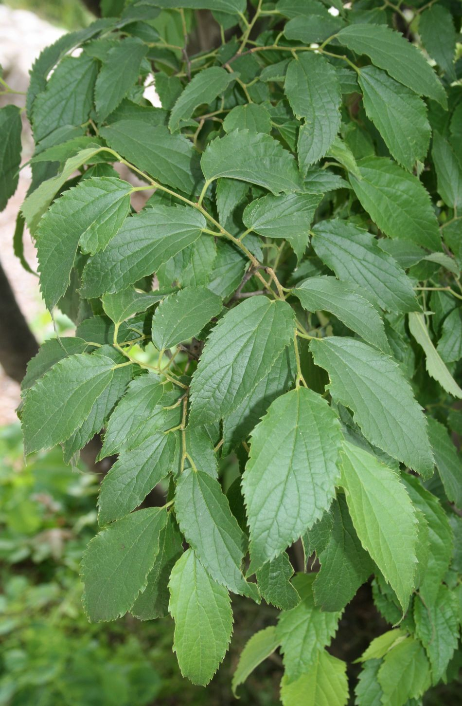 Celtis australis, Hanfgewächse (Cannabaceae) - Italien/Italia/Italy: Friuli-Venezia Giulia, Prov. Trieste, Rilkeweg/Sentiero Rilke von Sistiana nach Duino